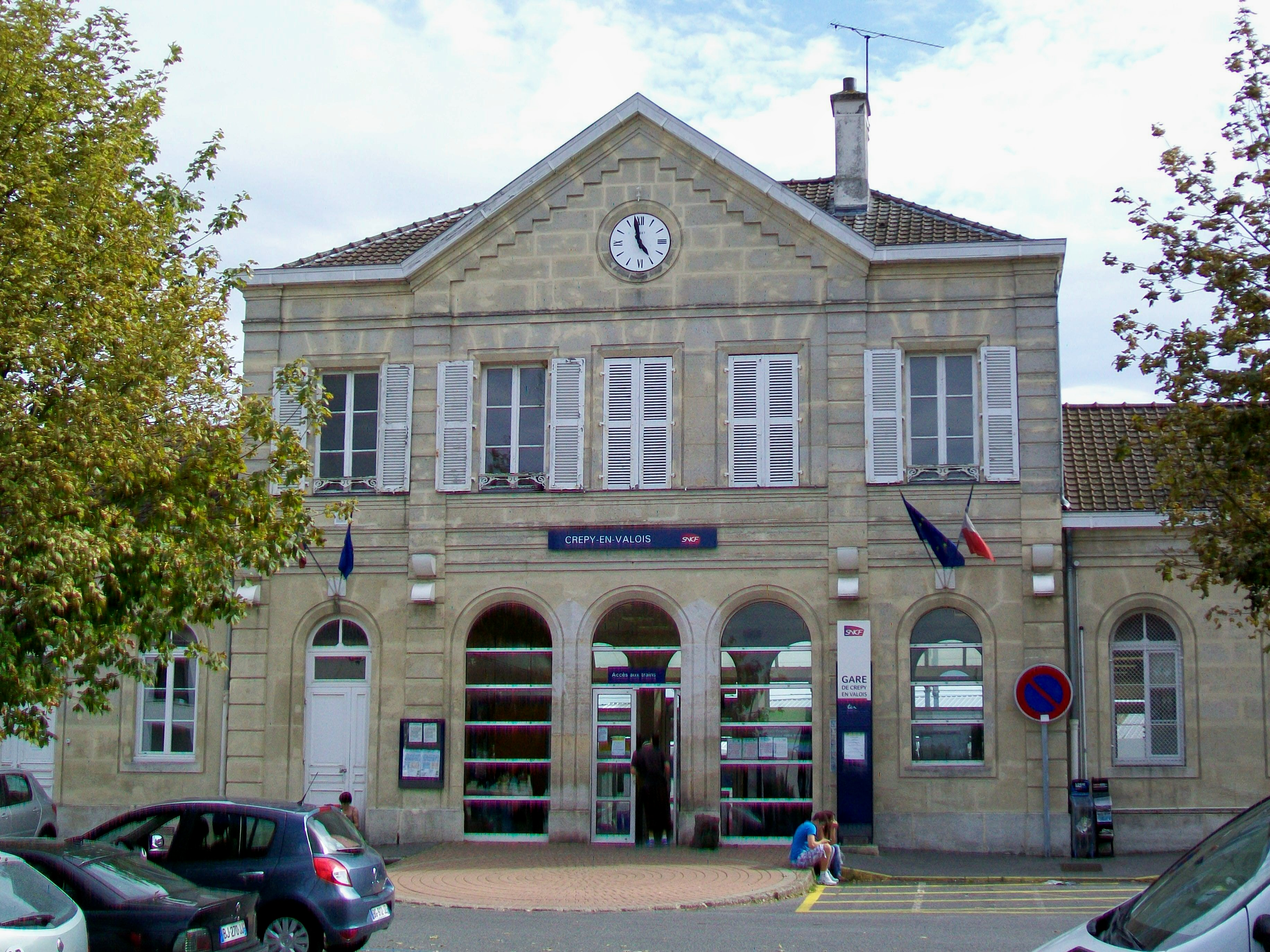 La place de la gare et le bâtiment-voyageurs (façade nord). Le départ de la plupart des cars est à gauche, mais certains cars partent le long de la rue, à droite (arrêt non matérialisé par un poteau, mais seulement par un marquage au sol).